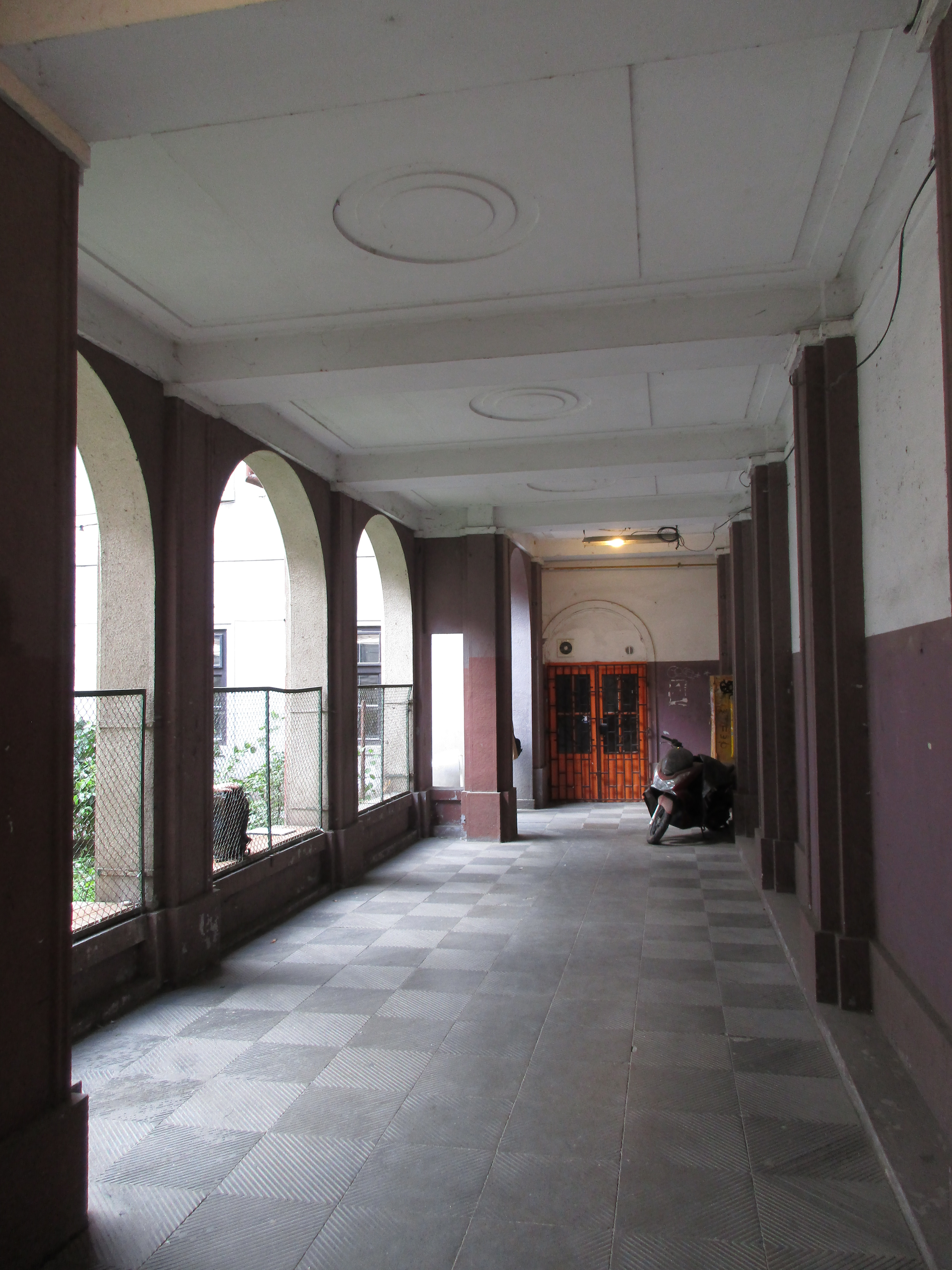 Nakladatelství Vilímek.